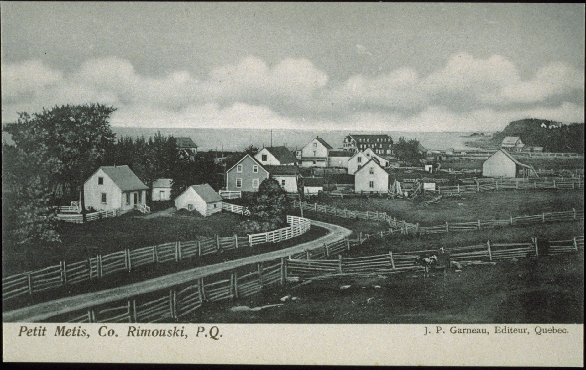 Petit Métis, Co. Rimouski, P.Q. , carte postale, J.P. Garneau, Éditeur